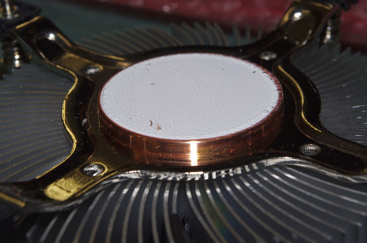 Prozessorkühler mit industriell aufgetragener Wärmeleitpaste, leider ab Werk verschmutzt.